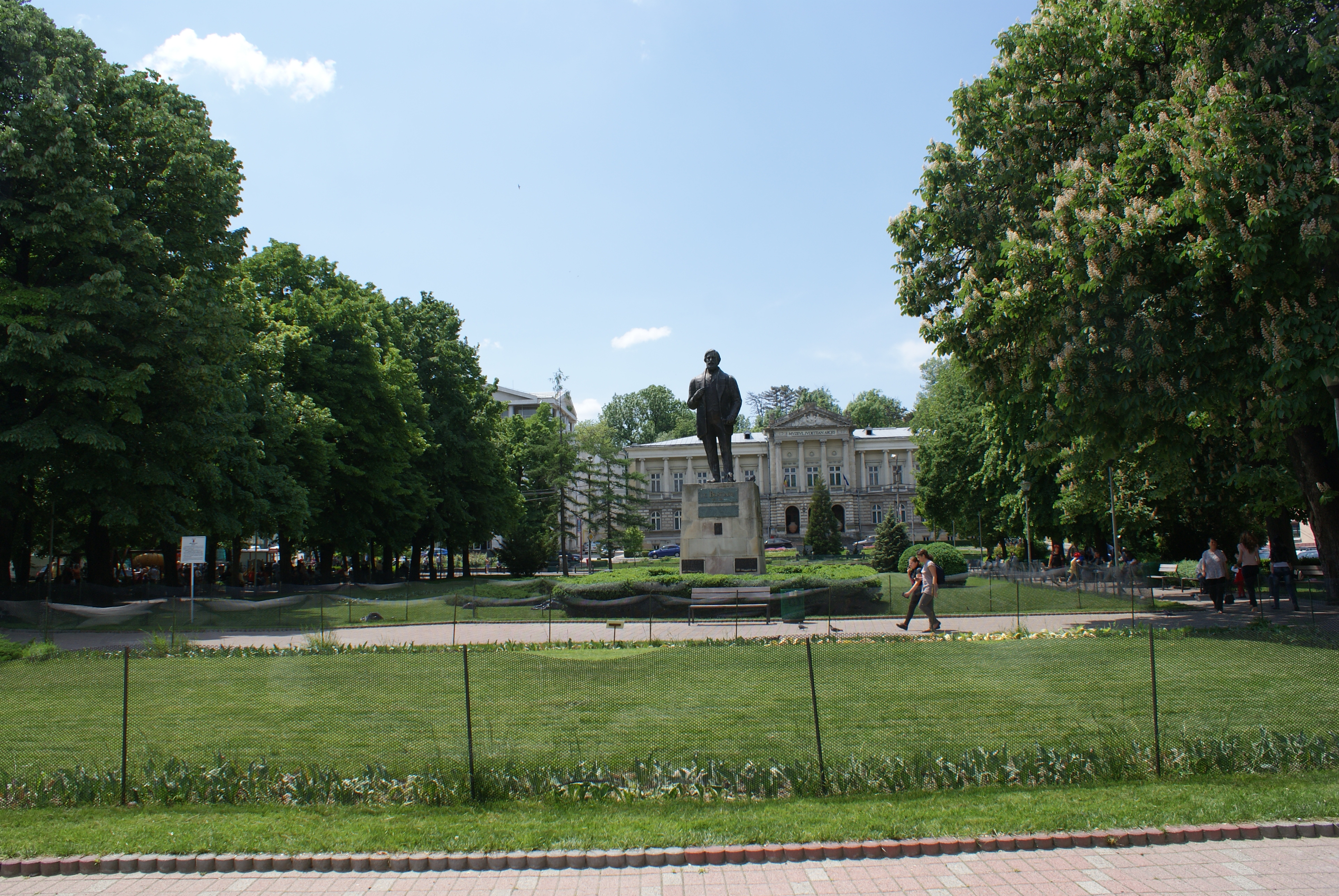 Parc. Statuia lui I.C. Brătianu 02